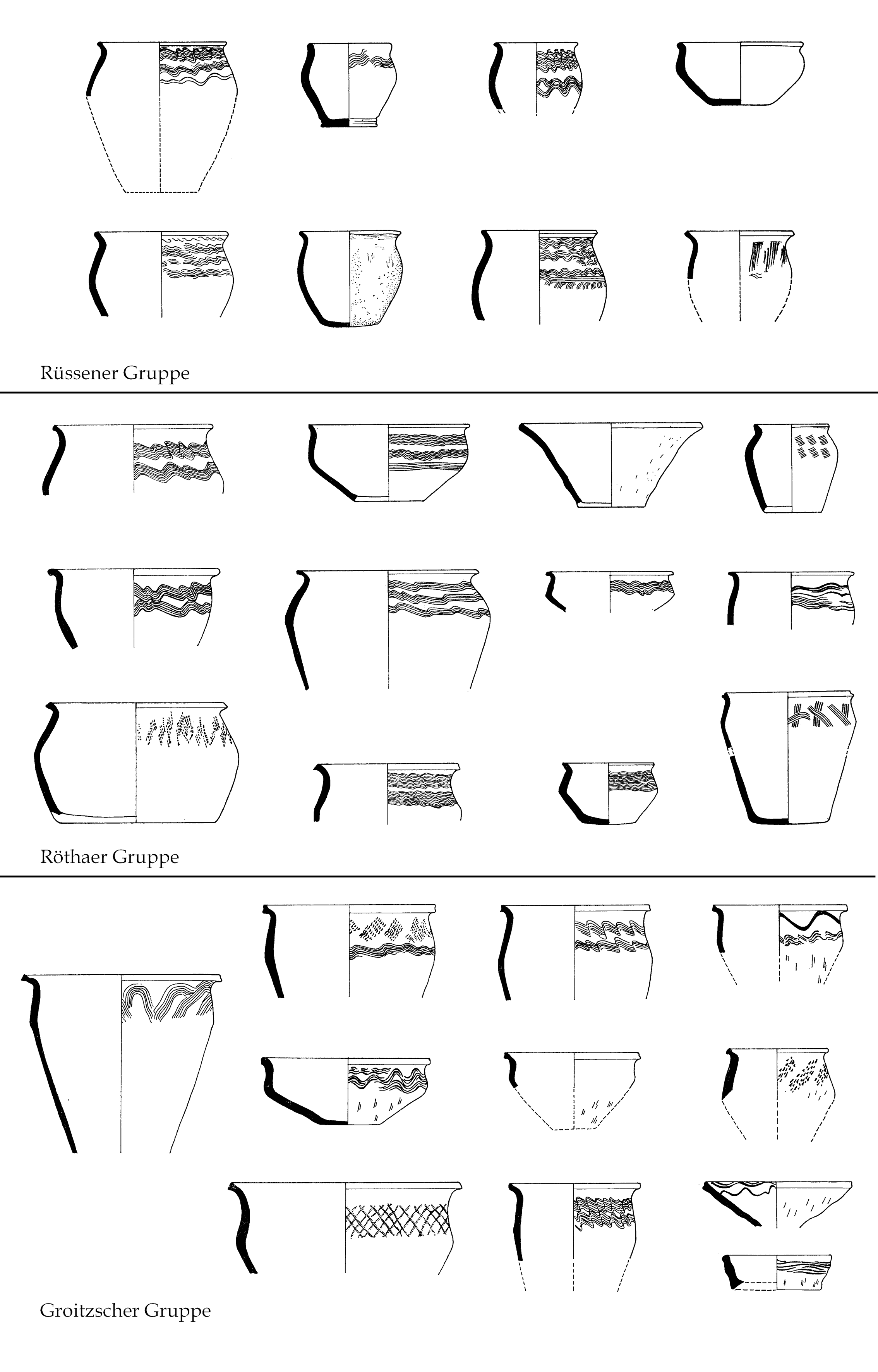 Typische Gefäße der Rüssener, Röther und Groitzscher Gruppe des Leipziger Kreises (nach Grabolle 2008, S. 29 Abb. 4, unter Verwendung der Fundzeichnungen nach Vogt 1987, 161 Abb. 126, 167 Abb. 130, 173 Abb. 132).